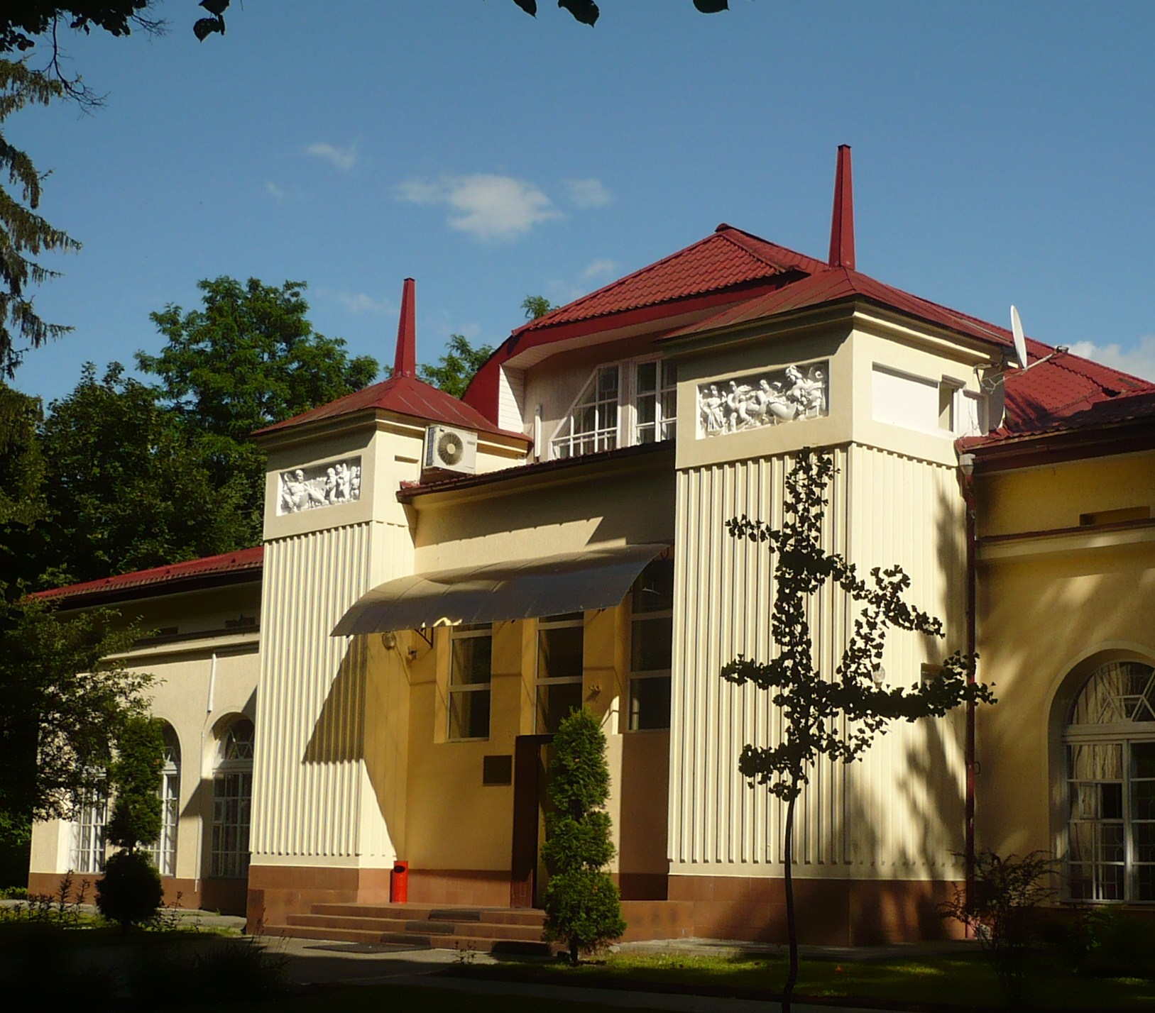 Lwów. Pawilon w Parku Stryjskim